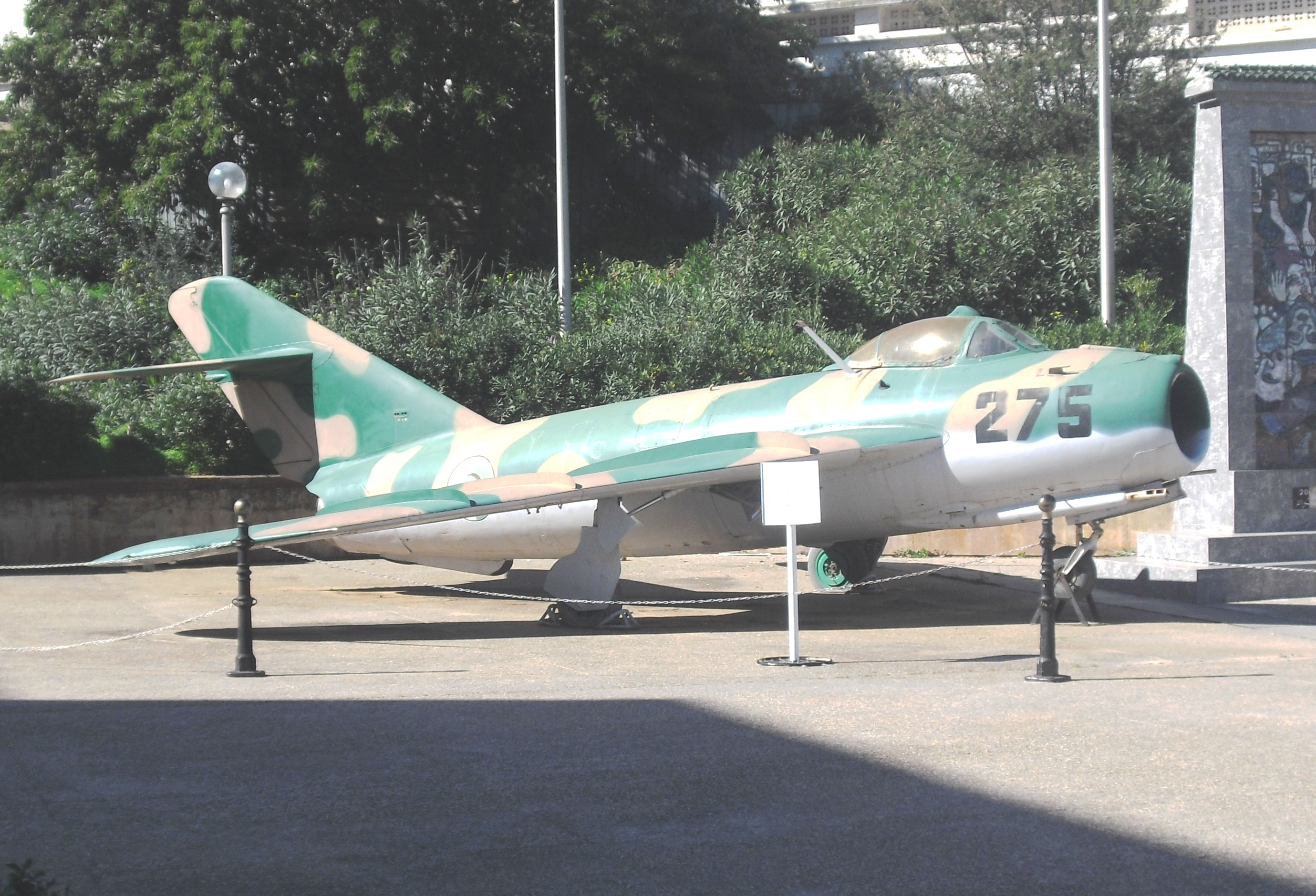 Avion au Musée de l'Armée, Alger